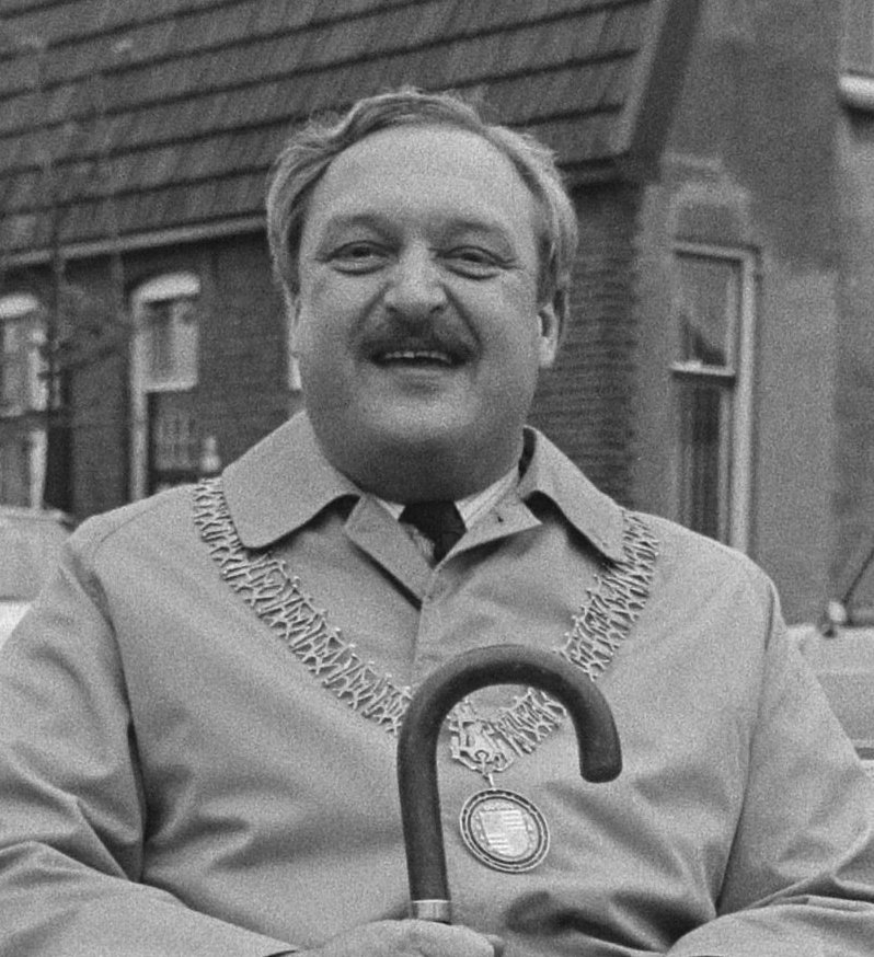 Straatnaambord "Simon Vestdijkhof" in Doorn onthuld door mevrouw mr. A. C. M. Vestdijk-van der Hoeven ; burgemeester Reering van Doorn en mevr. Vestdijk